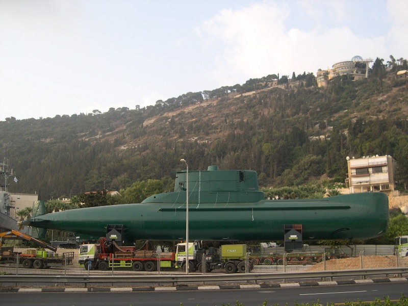 HN-INS Gal (wave), אח"י גל